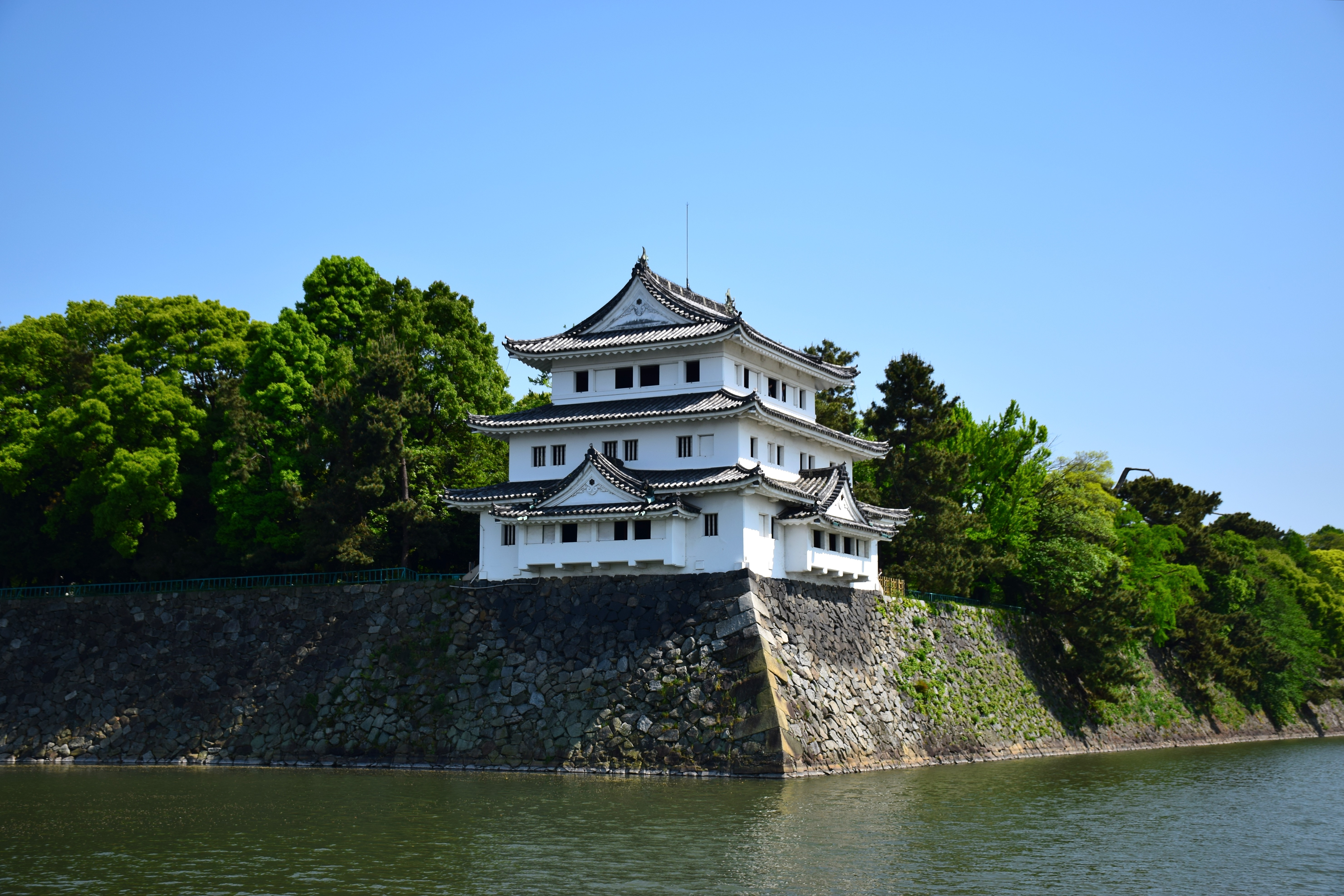 名古屋城清洲櫓